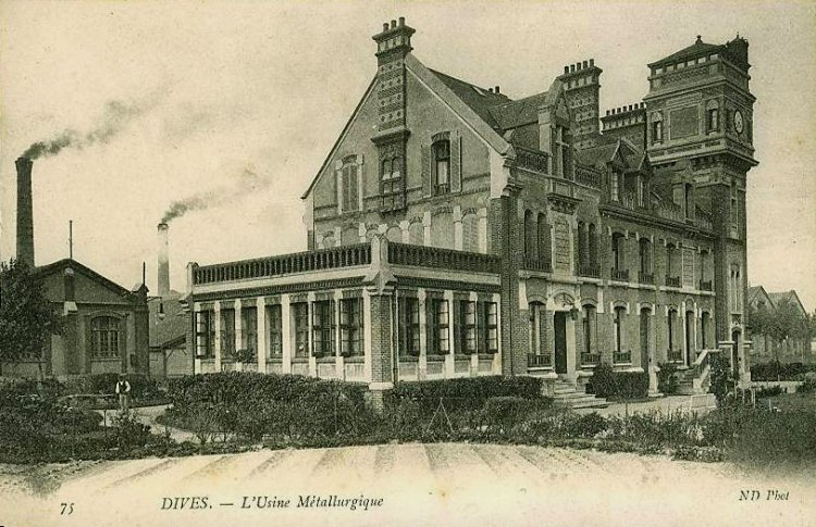 Usine Tréfimetaux à Dives-sur-Mer, sur une carte postale de la fin du 19e ou du début du 20e siècle. Vue du Sud.